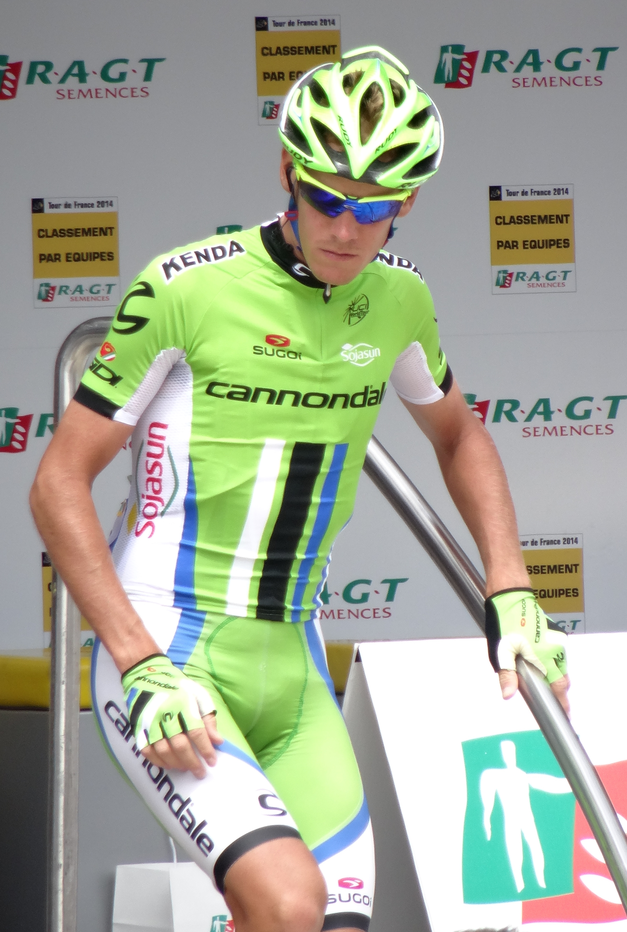 Reportage photographique réalisé le mardi 8 juillet à l'occasion du départ de la quatrième étape du Tour de France 2014 au Touquet-Paris-Plage, Nord-Pas-de-Calais, France.